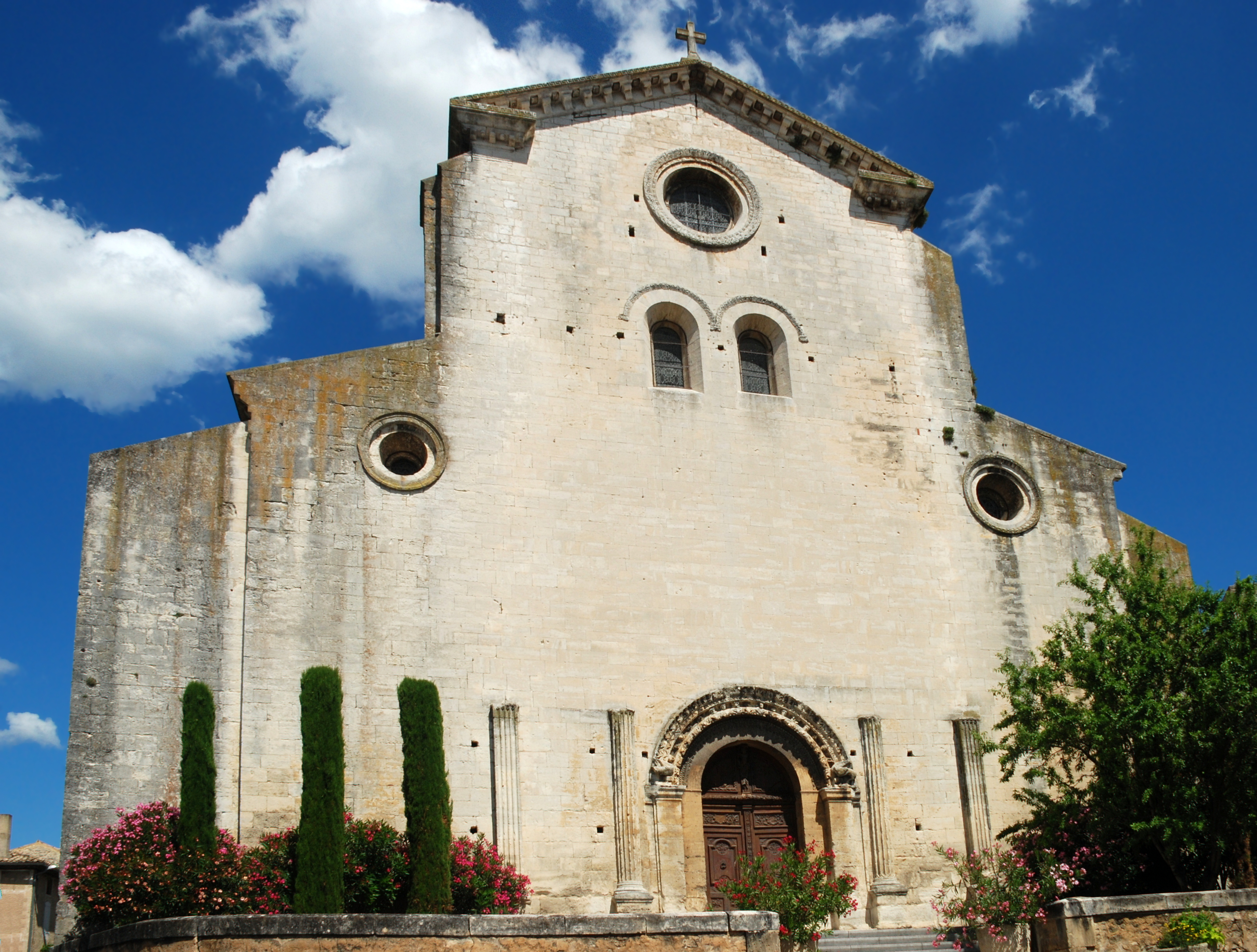 Cathédrale de Saint-Paul-Trois-Châteaux